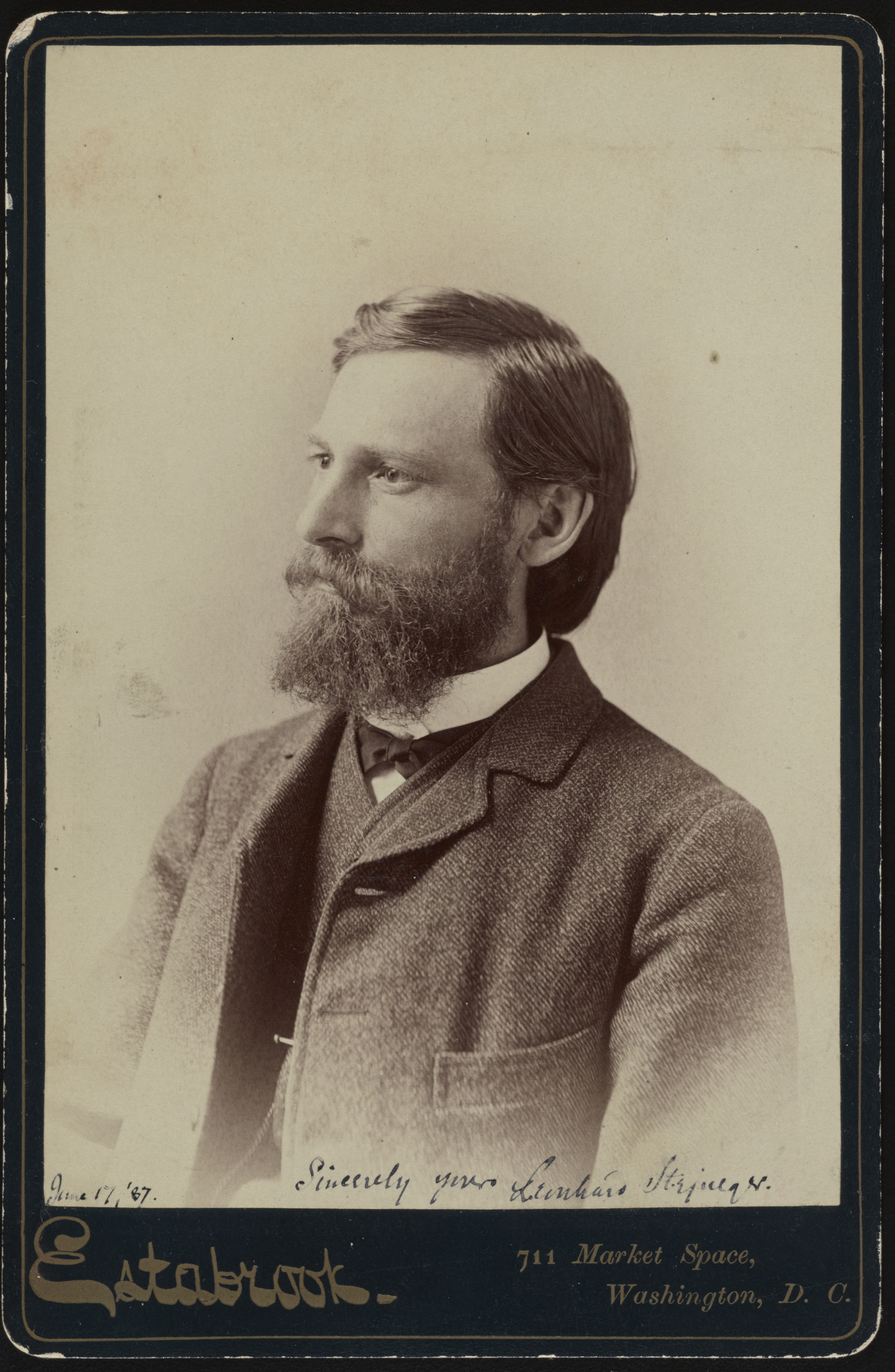 Leonhard Stejneger aged 36